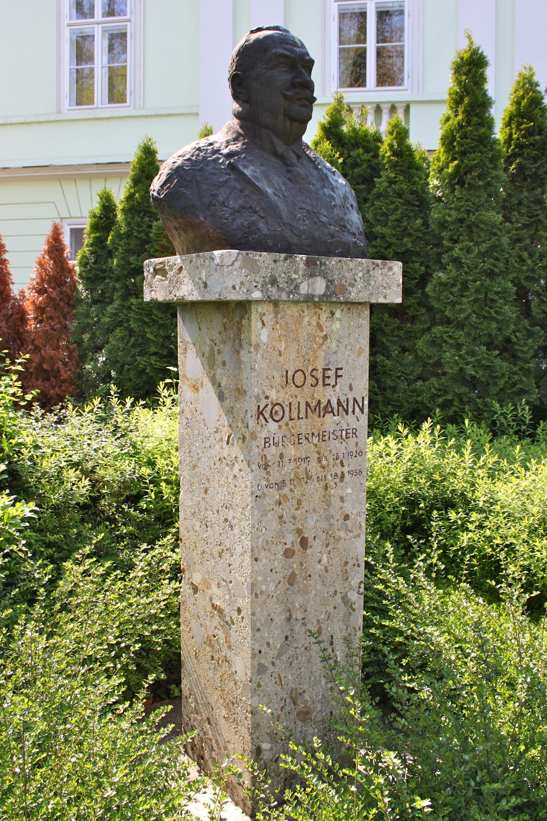 Büste des Bürgermeisters Josef Kollmann in Baden, Niederösterreich.